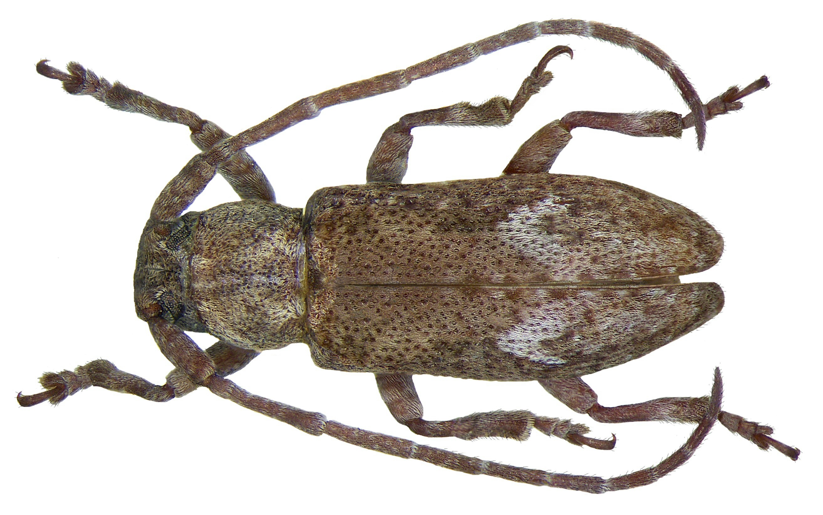 Familie: Cerambycidae Grösse: 5 mm Fundort: Papua Neuguinea, Doing Type, Coll. Museum London Foto: U.Schmidt, 2007